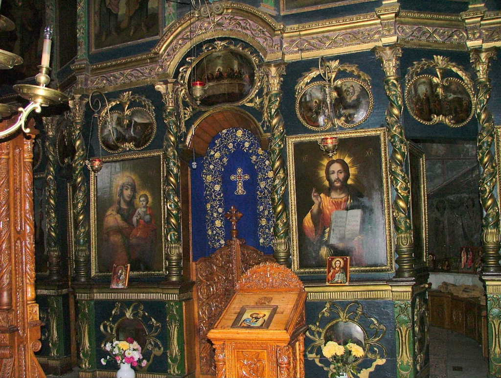 Mănăstirea Cetăţuia